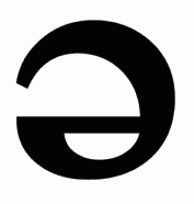 Schwa.